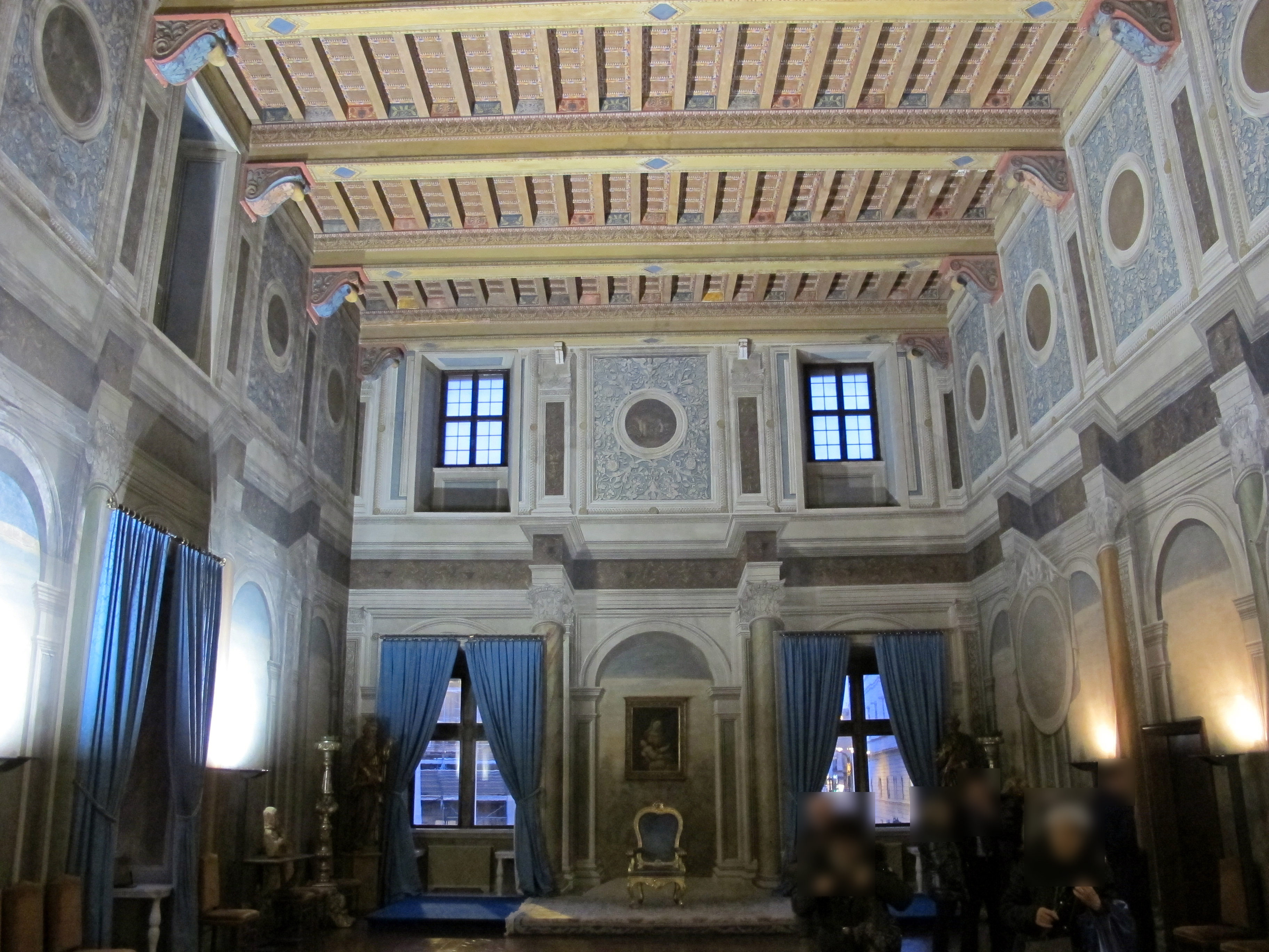 Palazzo dei Penitenzieri - Interno